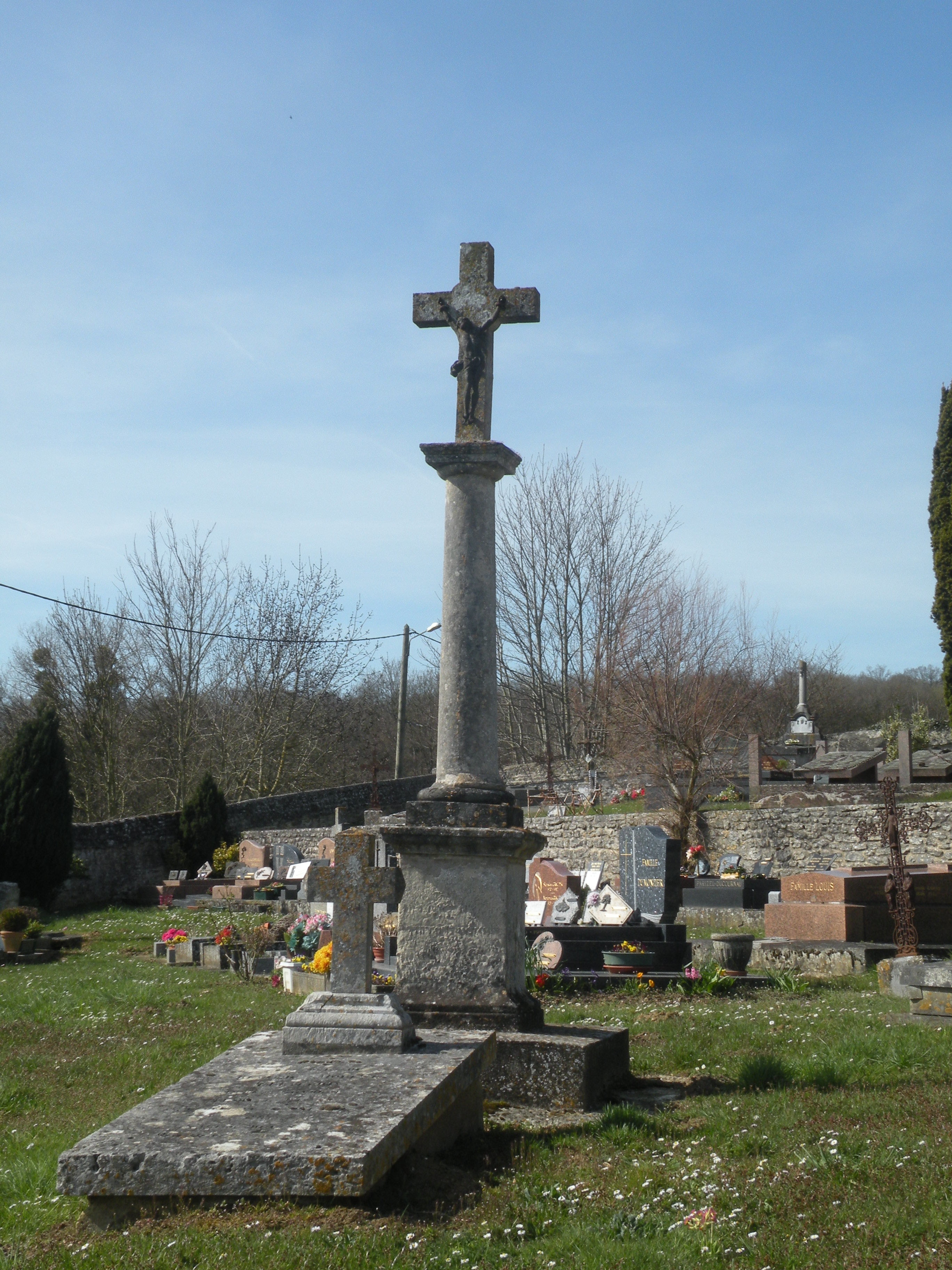 Chambors cimetière